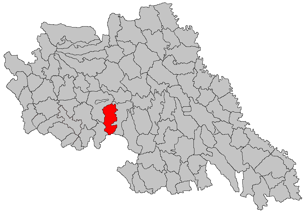 Categorie:Hărţi ale judeţului Iaşi